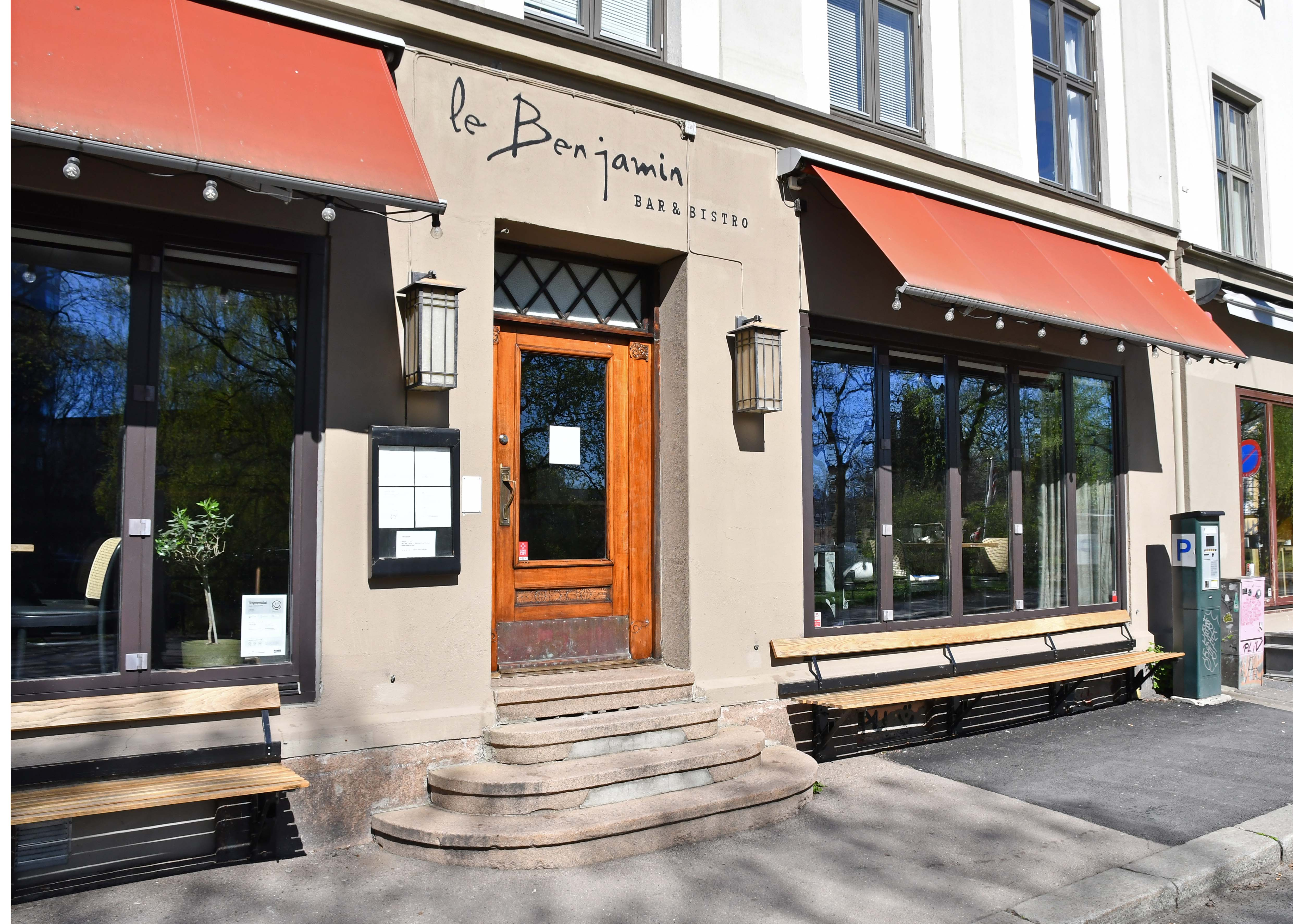 Benker hengt på sokkelen på murgård. Le Benjamin Bar & Bistro, Søndre gate 6, Grünerløkka